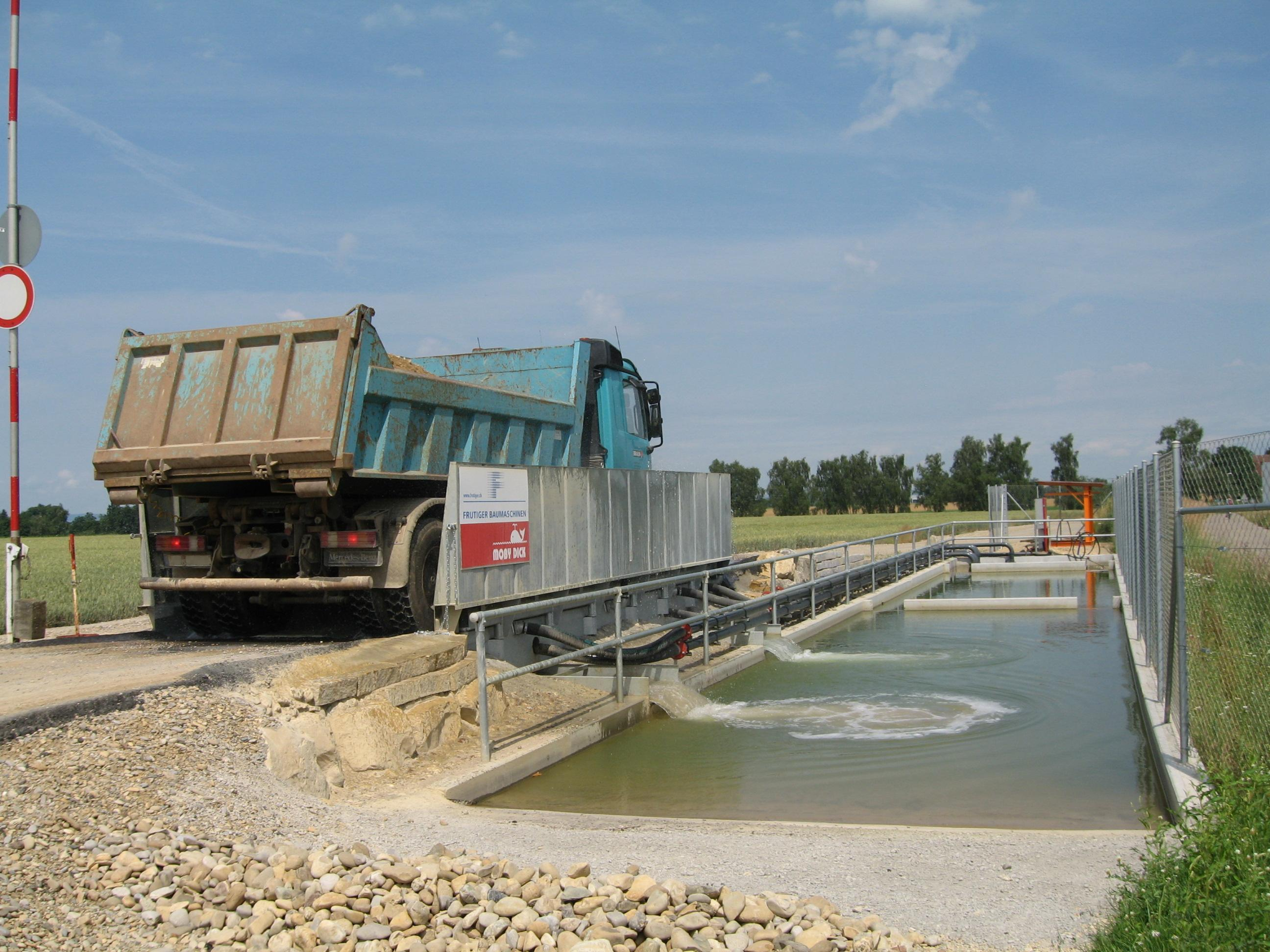 Frutiger MD Quick